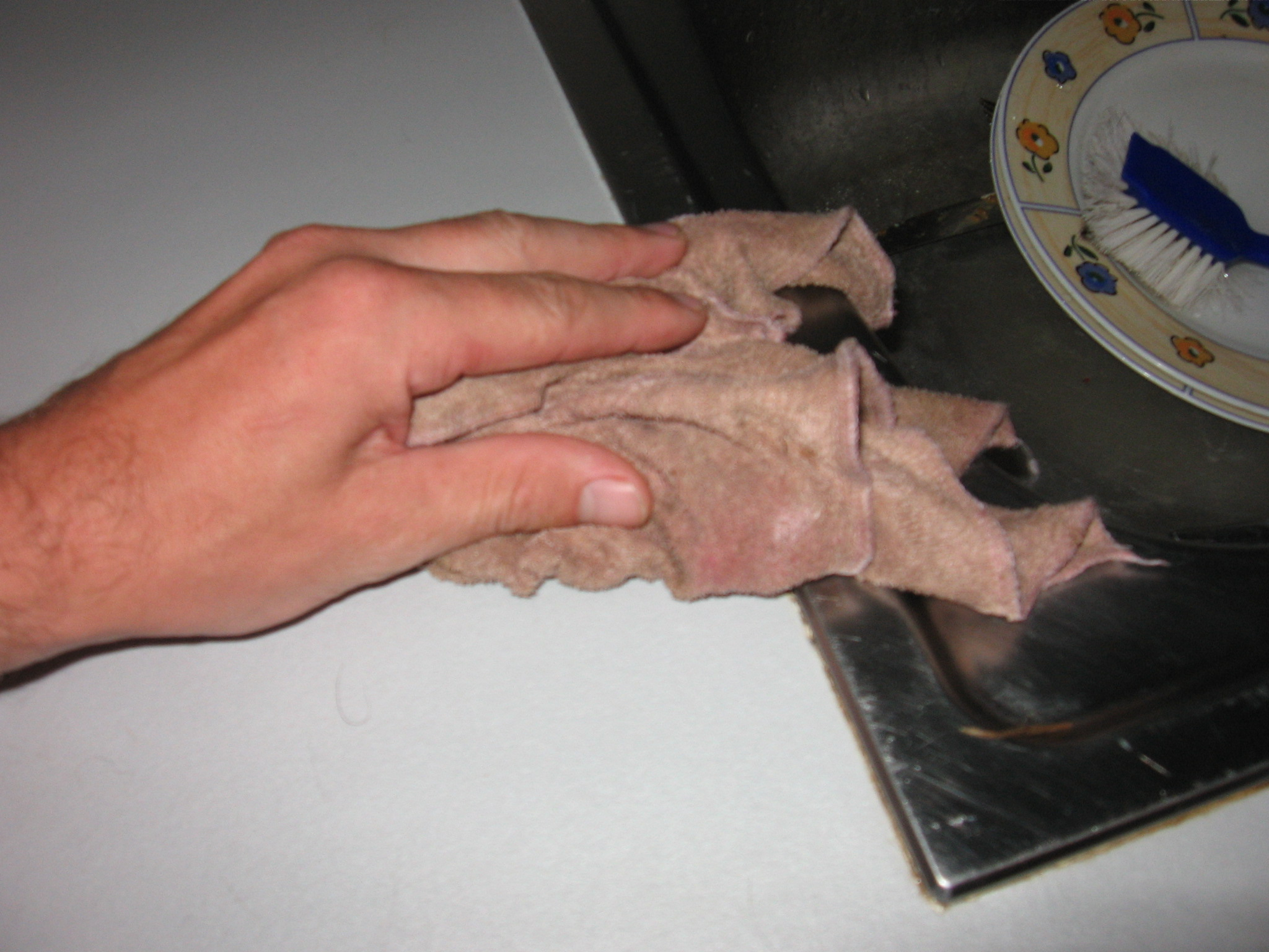 vaatdoek (ja, ik mag wel weer een nieuwe gaan gebruiken..sorry)